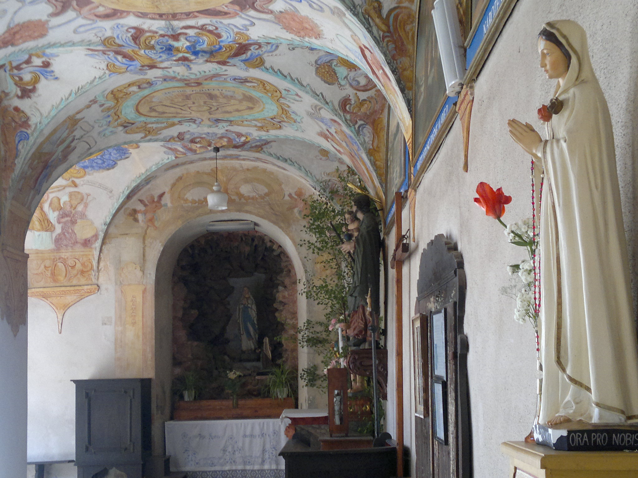 Ambit kostela sv. Ducha a Loretánské kaple Sancta Casa (Římov), Dolní Římov, Římov